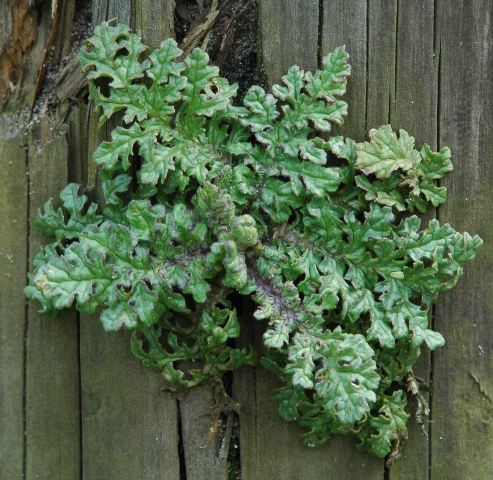 Rozet Jakobskruiskruid in het Westerpark in Amsterdam.